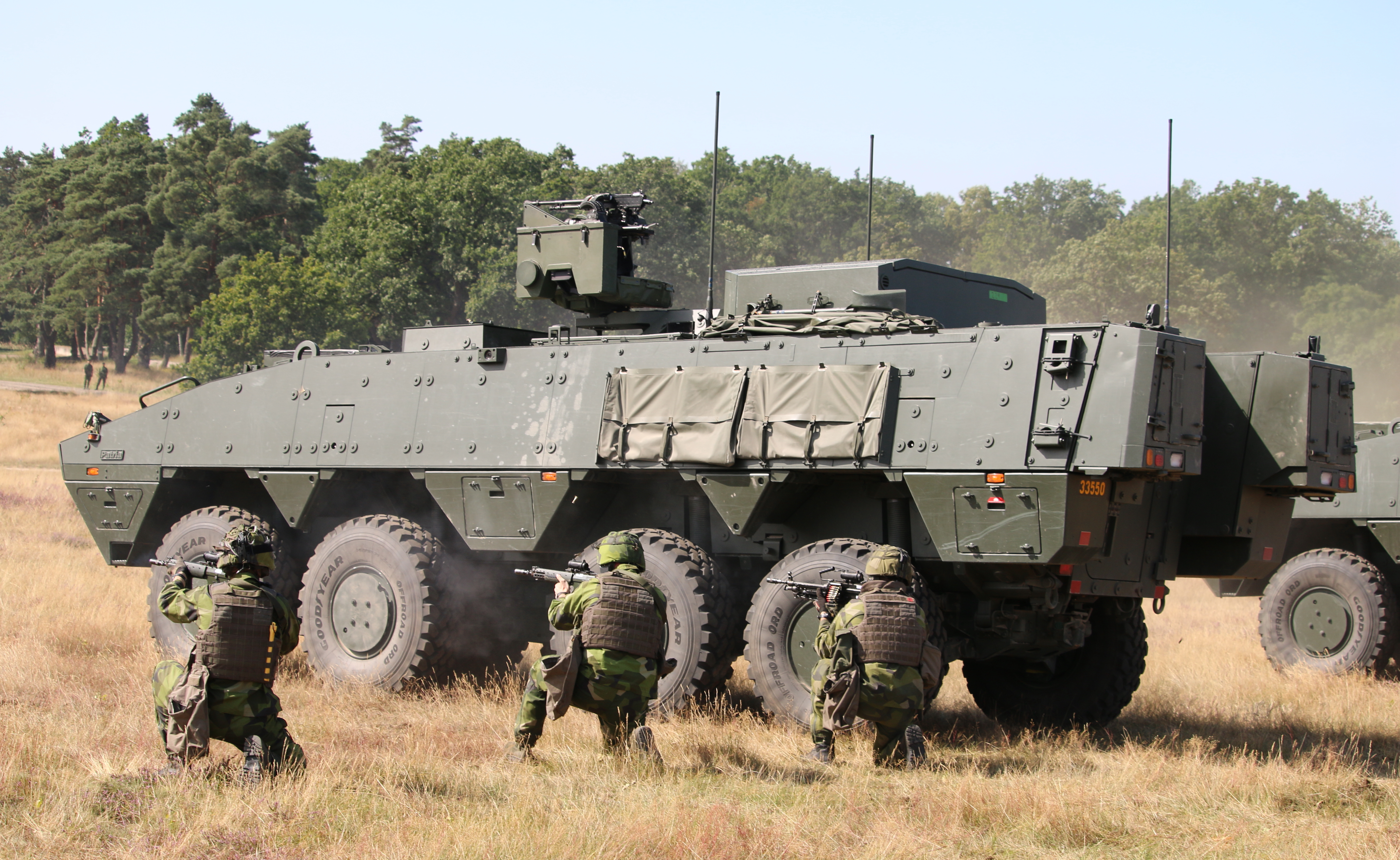 Pansarterrängbil 360 Revinge 2015